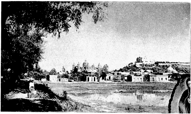 Vista de oriente al poniente de la ciudad de Guadalupe Hidalgo, proveniente del libro México Ilustrado, Distrito Federal, su descripción, gobierno, historia, comercio e industrias, Edicion Bilingue Español E Ingles, Tomo VII, Gobierno del Distrito Federal, Mexico, 1903. Pag. 115.